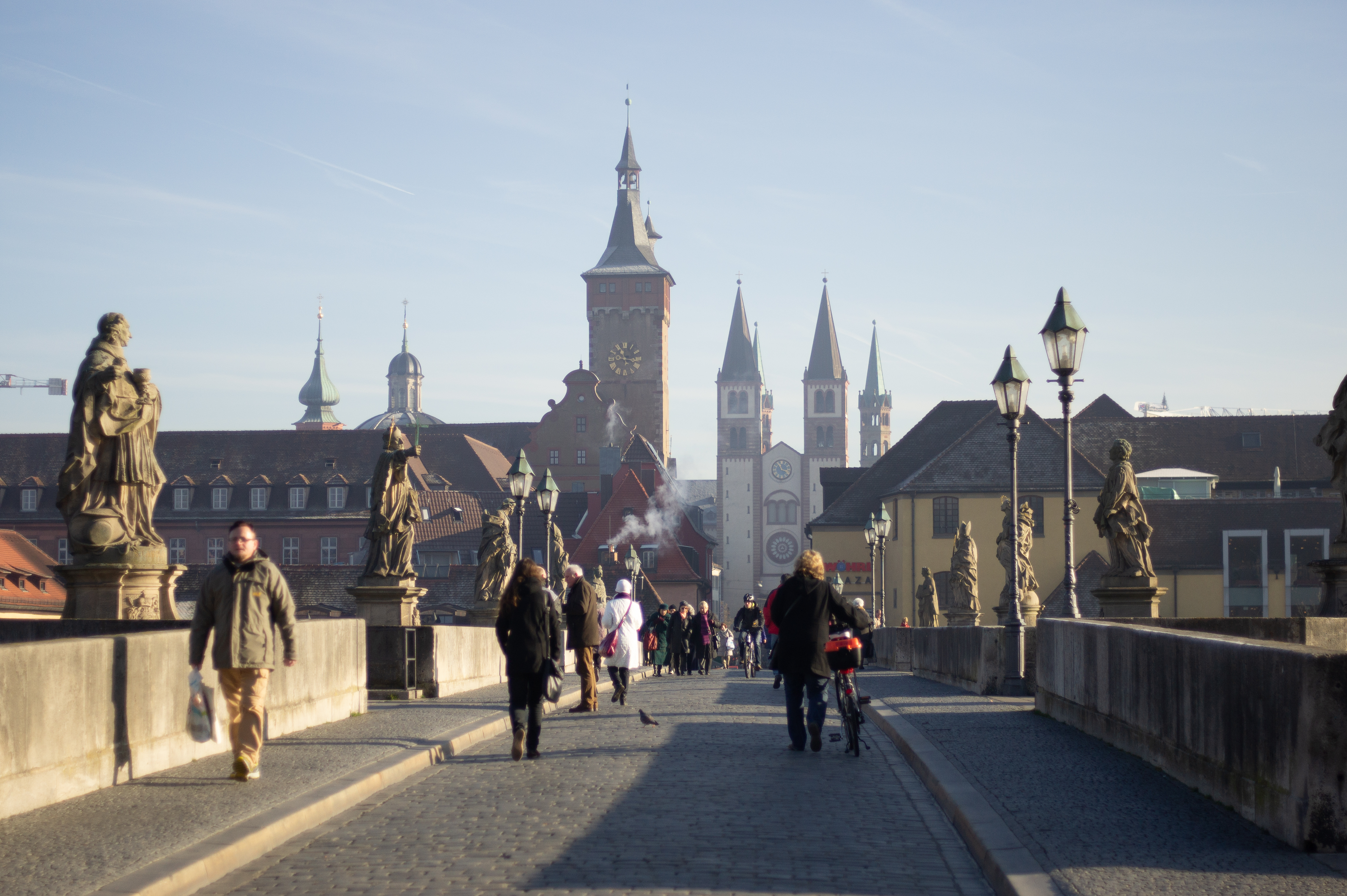 Alte Mainbrücke in Würzburg in ihrer Nutzung als Fußgänger- und Radweg. Im Hintergrund die Altstadt, Alte Mainmühle, Wöhrl, Rathaus, Dom und Neumünster.